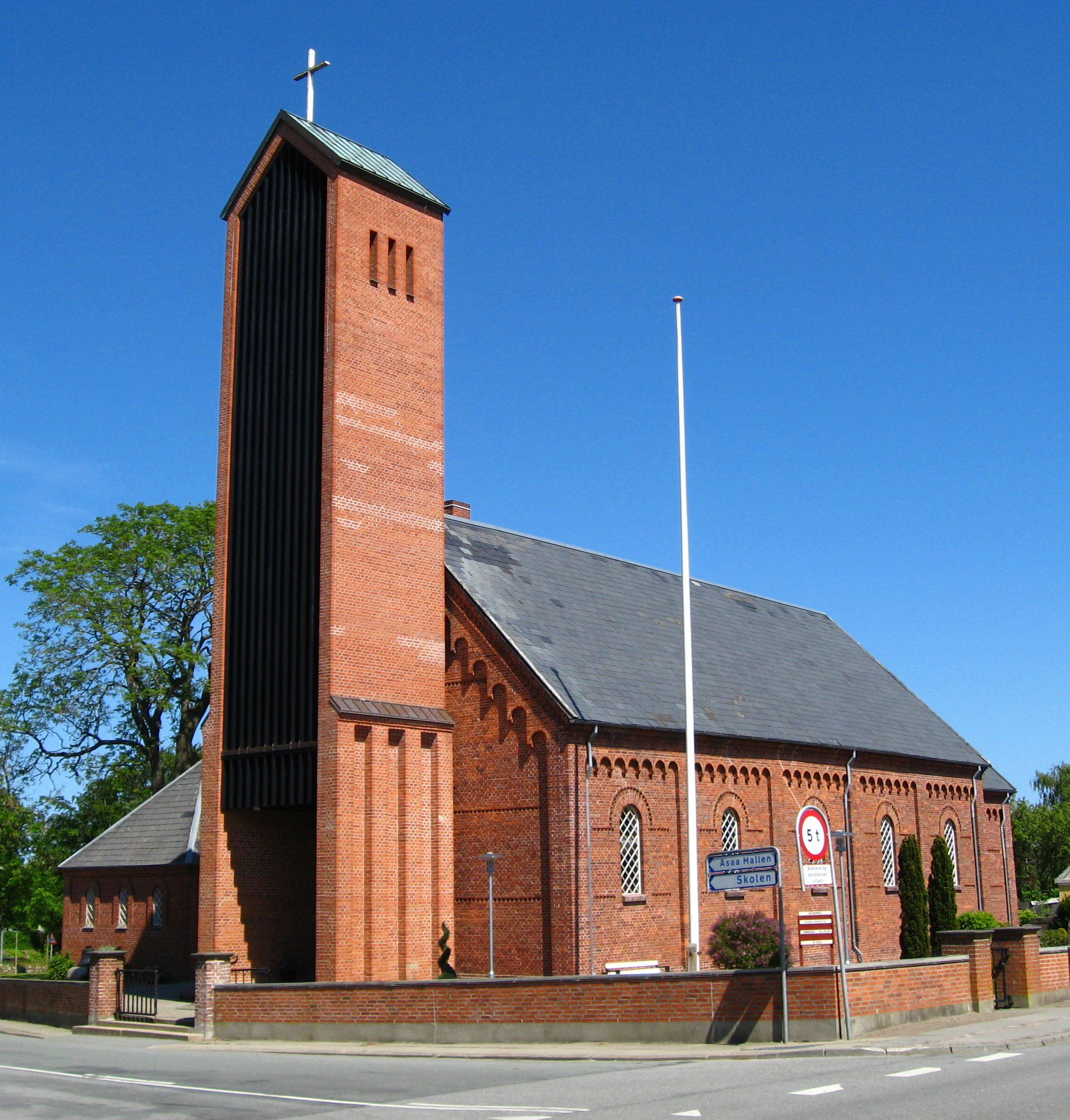 Asaa / Aså Kirke, Brønderslev Kommune